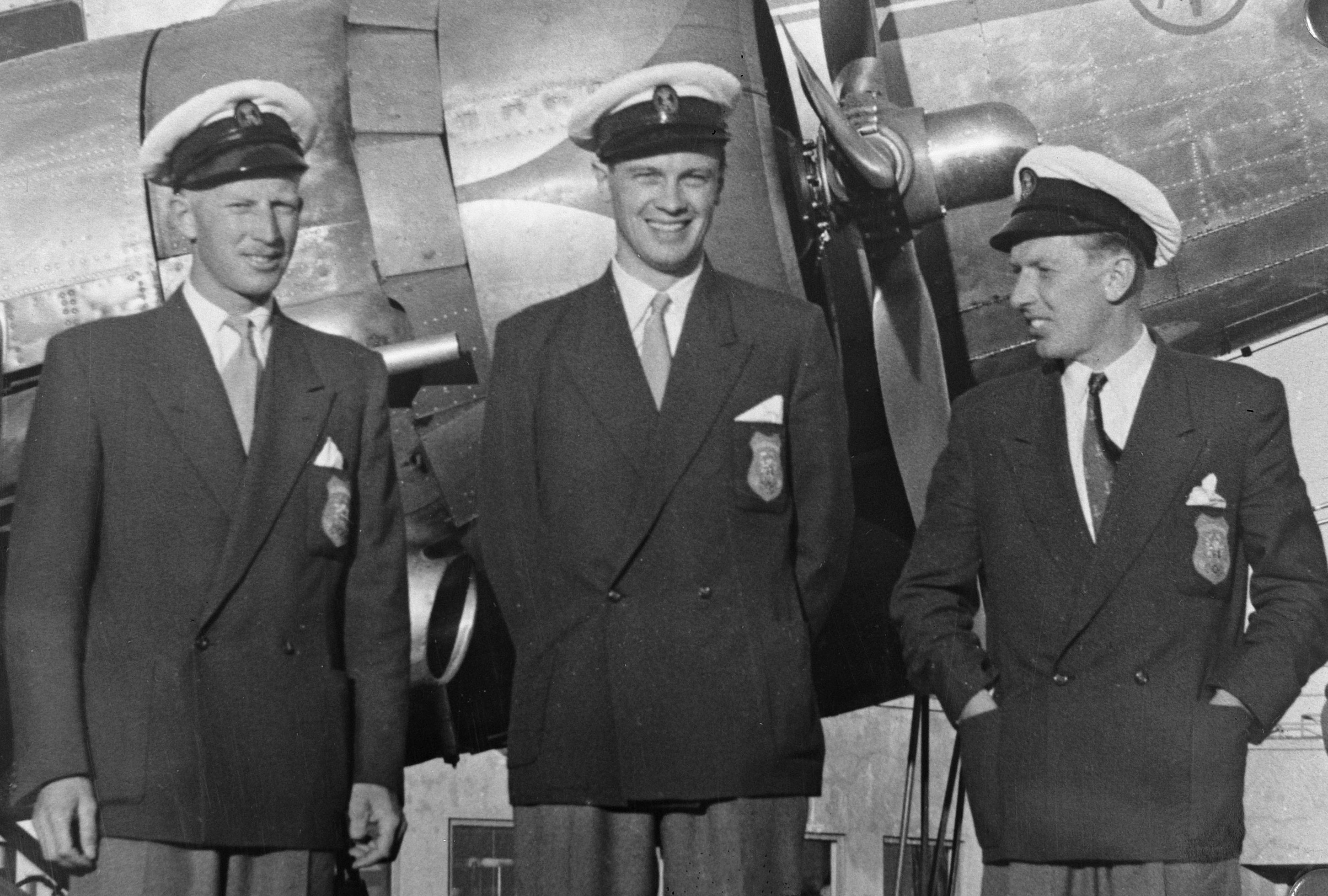 Olympische zeilers Drakenklasse; Abraham Everardus Dudok van Heel, Willem Paul van Duyl en Michiel Dudok van Heel